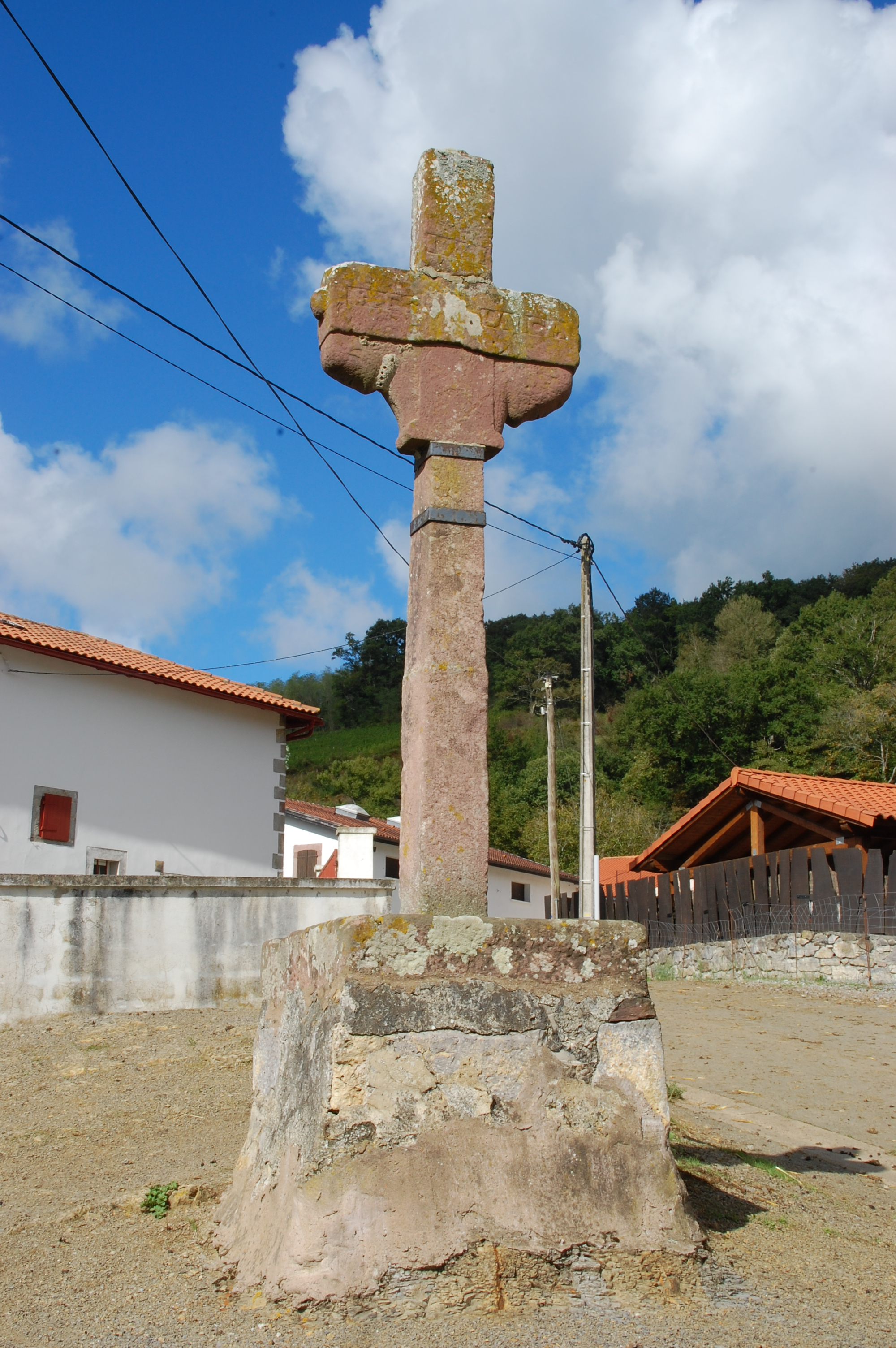 Croix de Sarrasquette. Insriptions: INRI Ave spes unica